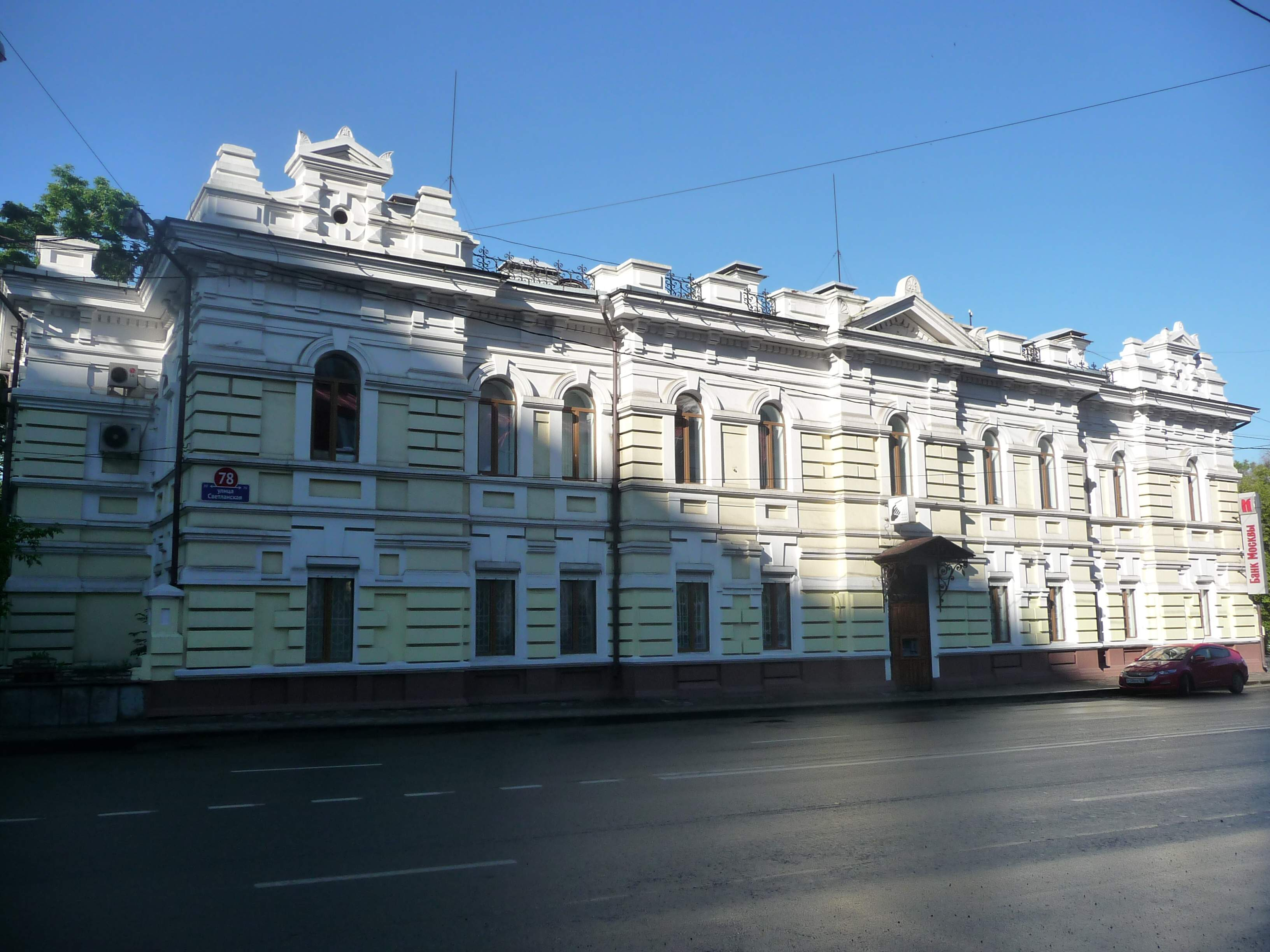 Владивосток, Светланская, 78, 2015-06-30